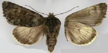 Lasionycta gelida female